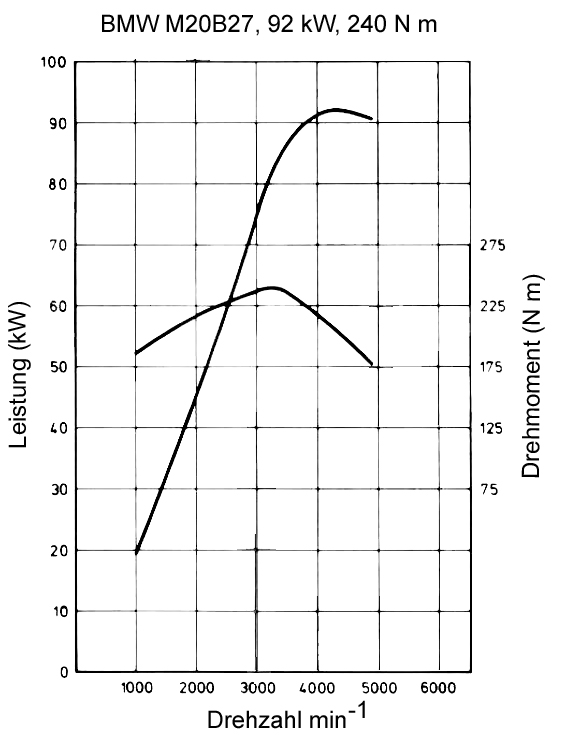 Drehmomentkurve BMW M20B27, eta-Motor, 92 kW, 240 N m